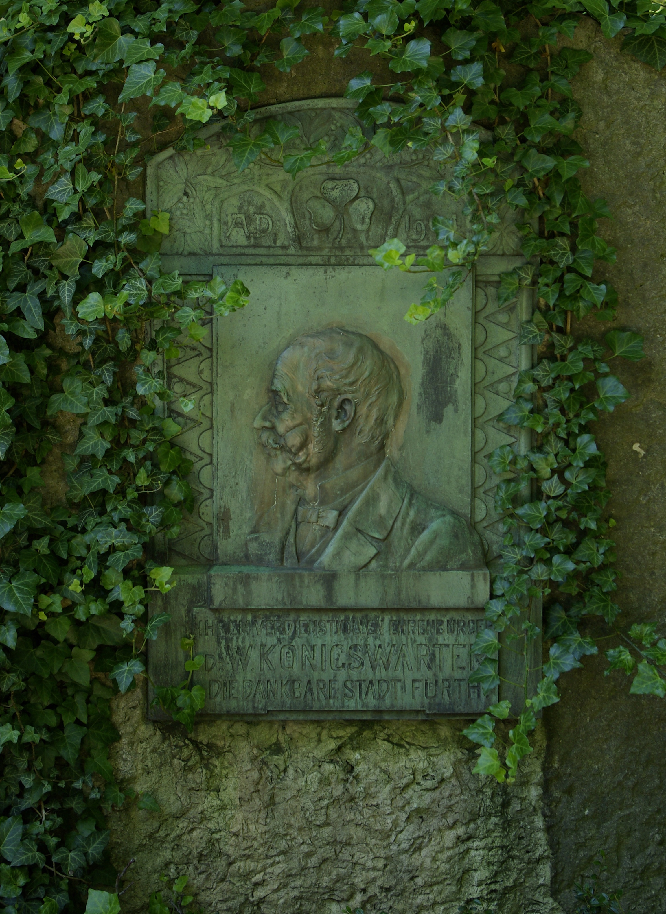 Das 1904 von Rudolf Maison gestaltete Wilhelm-Königswarter-Denkmal im Stadtpark in Fürth.